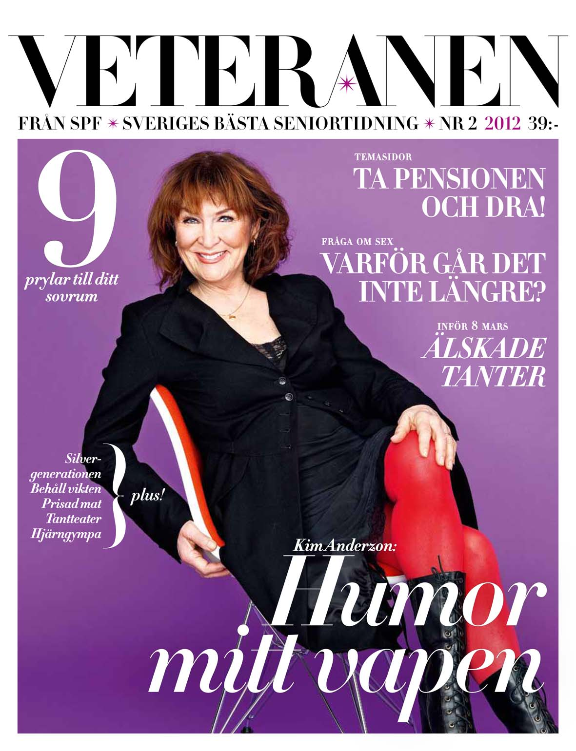 Omslag Veteranen nr 2 2012